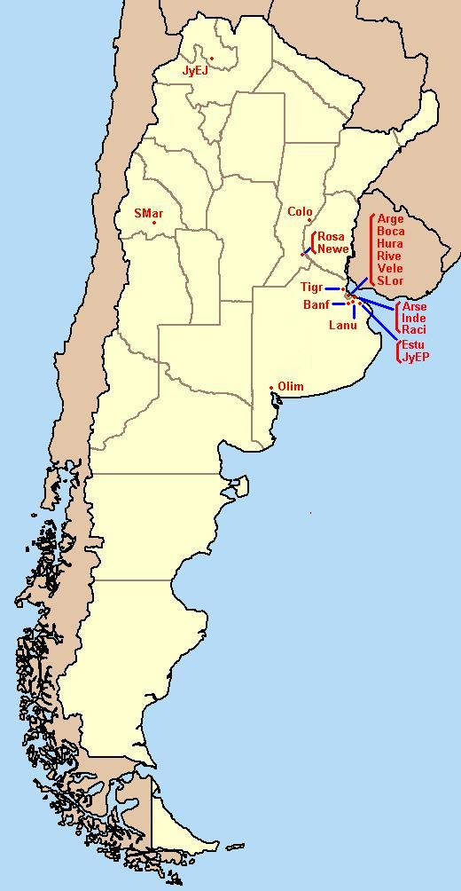 Mapa de la primera division argentina de futbol durante la edicion 2007-2008 marcado las ciudades o municipios exactos donde se enncuentran los estadios de futbol de los 20 equipos participantes